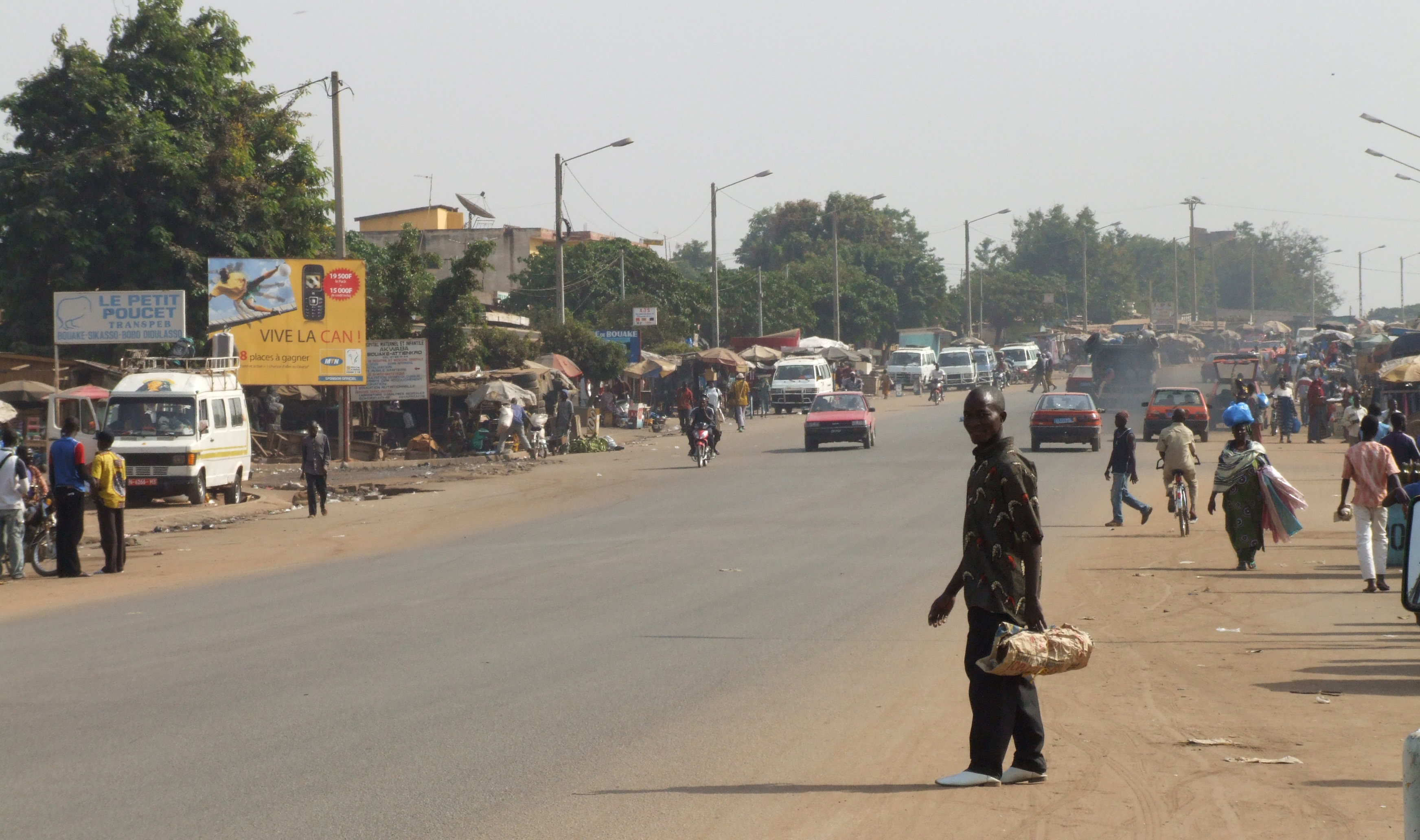 Bouaké